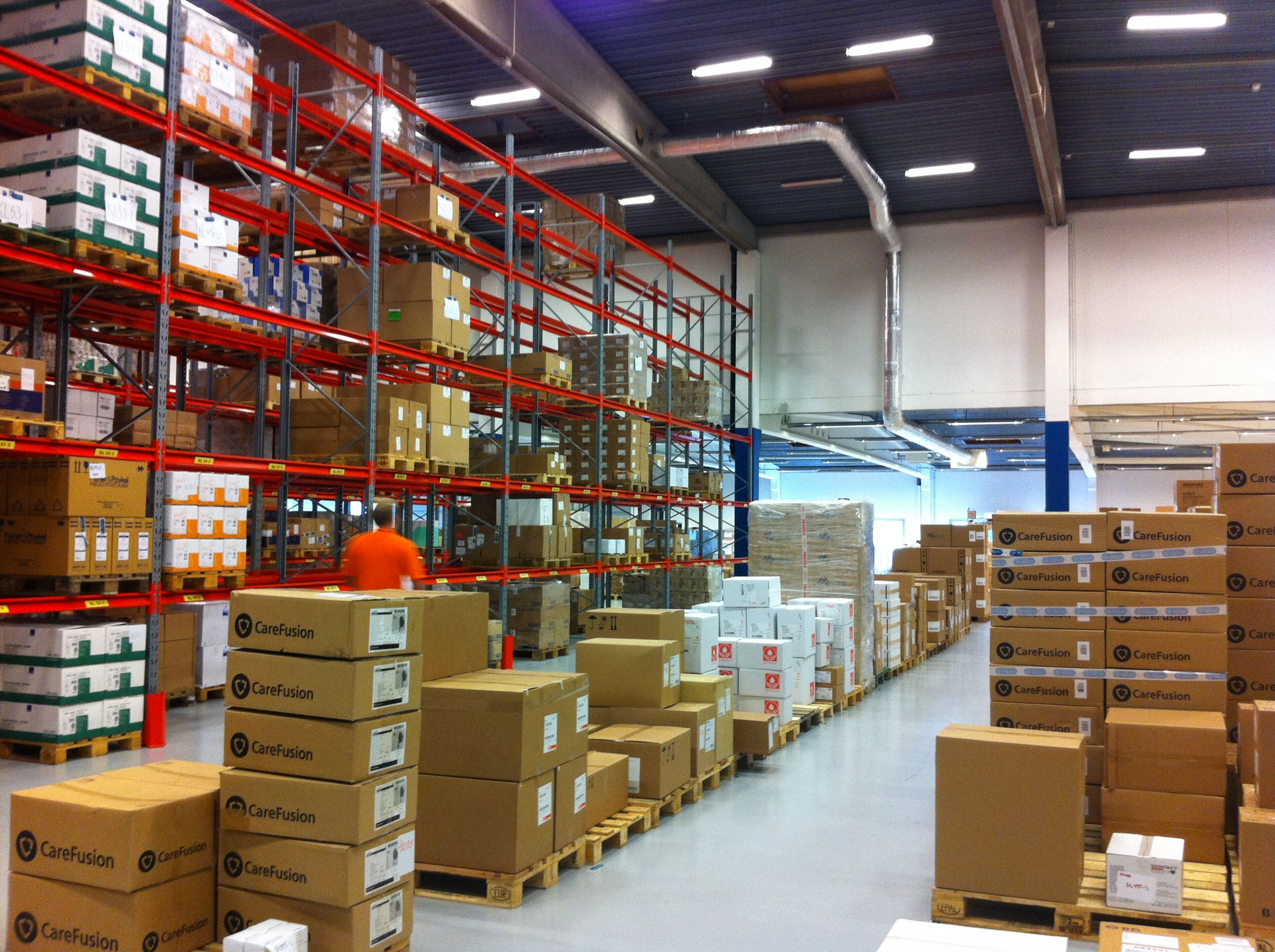 Mediq Sverige Kungsbacka warehouse